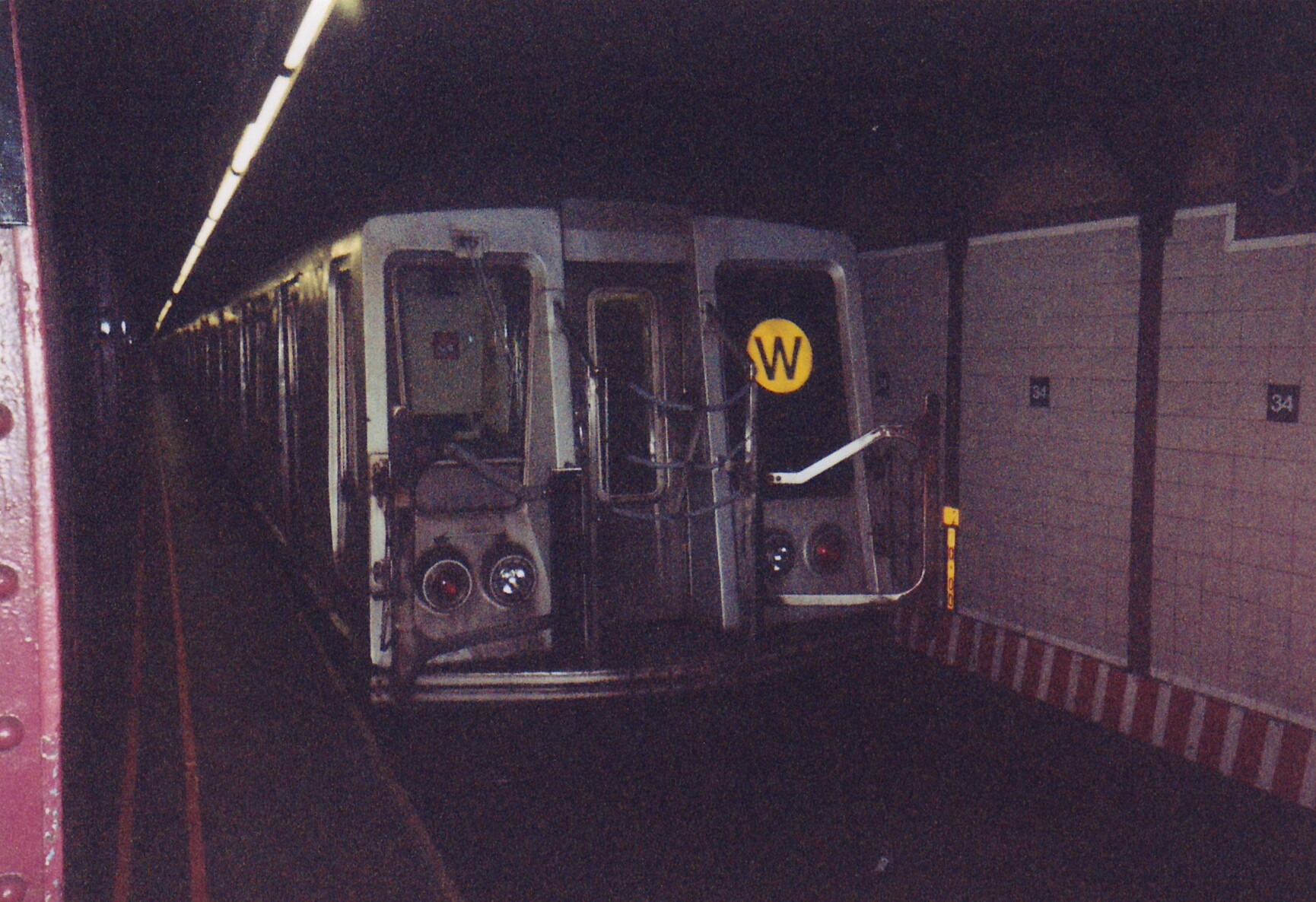 Tren W del metro de Nueva York